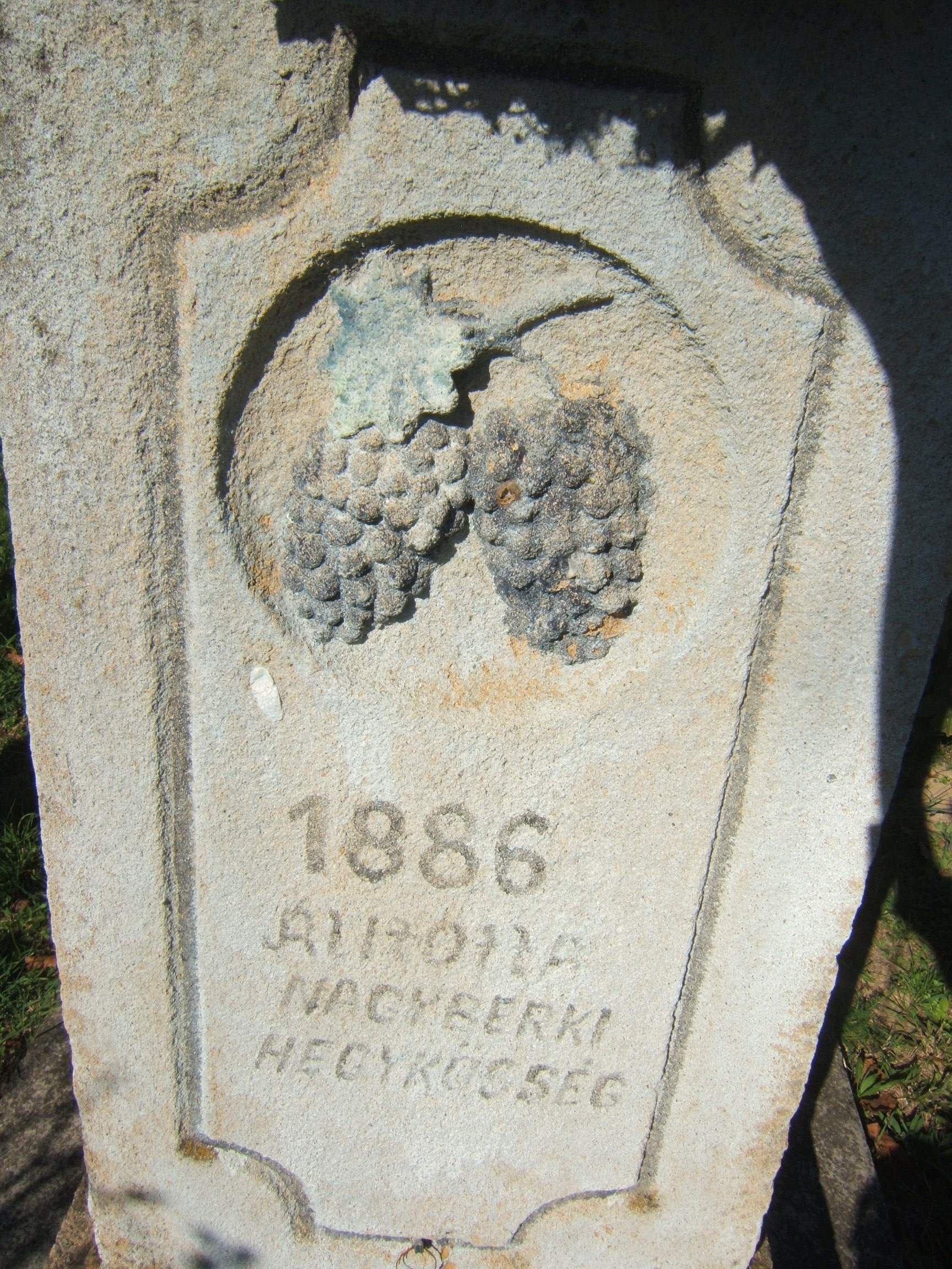 Nagyberki, Kata-hegyi kereszt